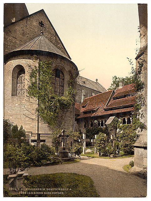 Tausendjähriger Rosenstock um 1900, Hildesheim Im Kreuzgang des Mariendom zu Hildesheim Public Domain